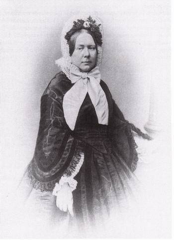 Paulina de Württemberg, reina de Württemberg ( Riga 1800 - Stuttgart 1873). Nascuda duquessa de Württemberg amb el tractament d'altesa reial contragué matrimoni en el si de la casa reial württemburguesa. (→Paulina de Württemberg (reina de Württemberg))